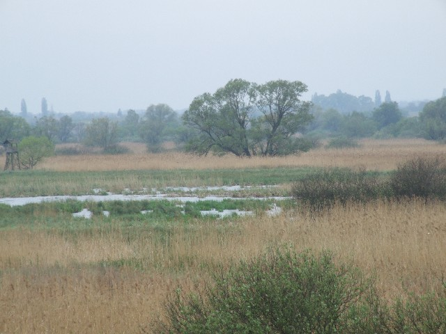 Táska határában lévő Fehérvíz